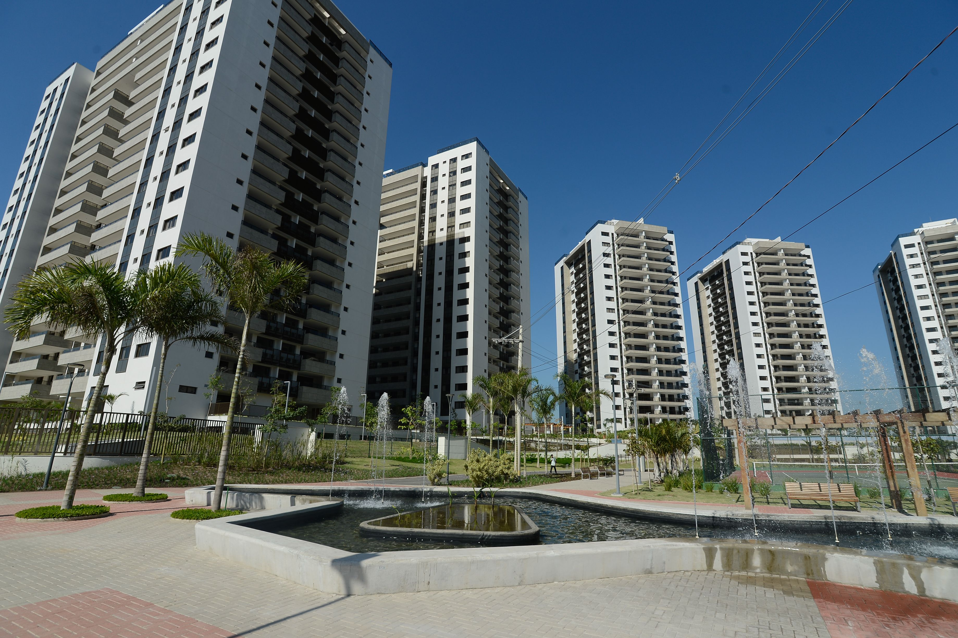 Rio de Janeiro - Vila dos Atletas, na Barra da Tijuca, zona oeste da cidade (Tomaz Silva/Agência Brasil)